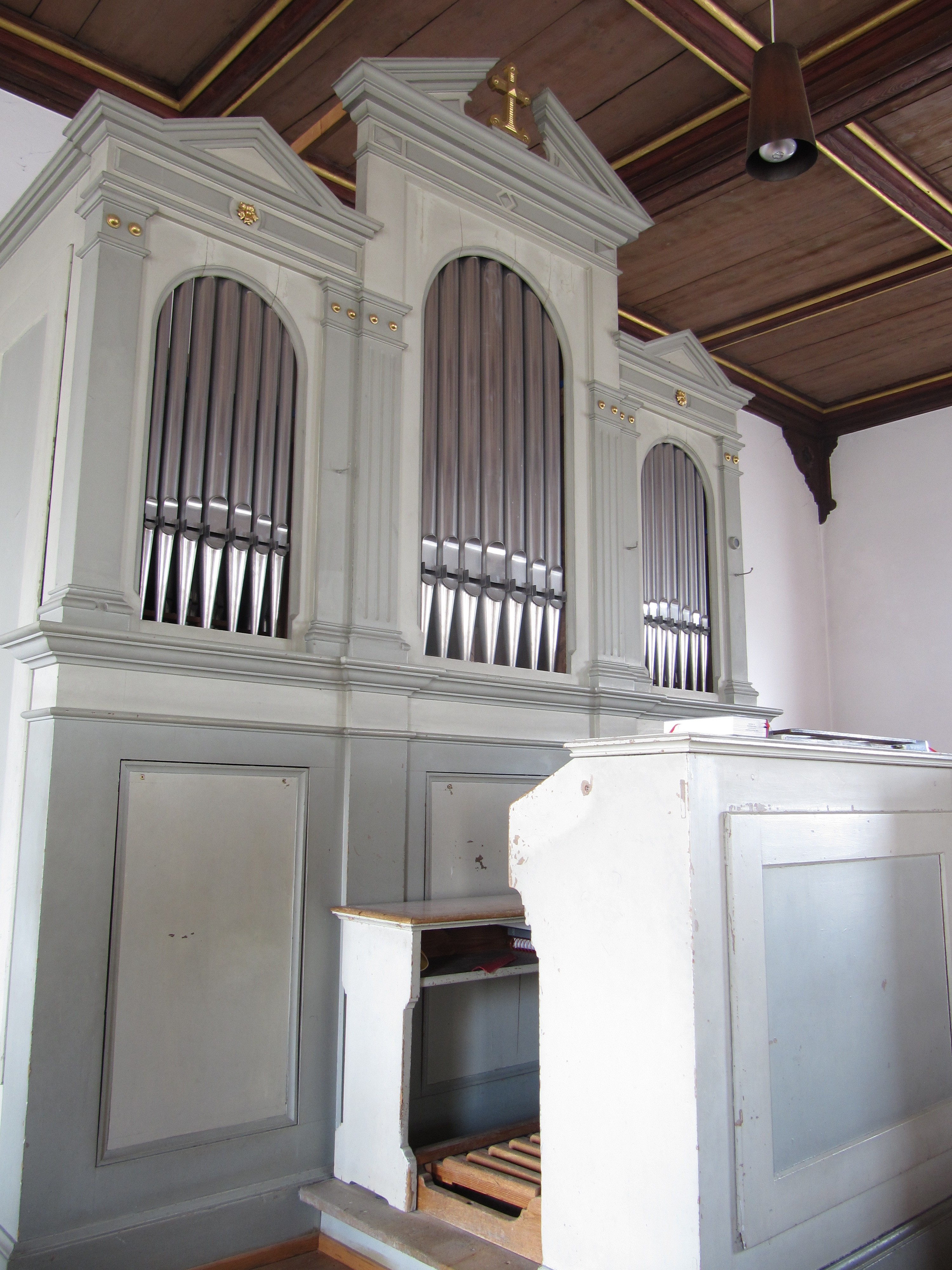 Orgel der Kirche Moosham, erbaut von Martin Binder, Regensburg